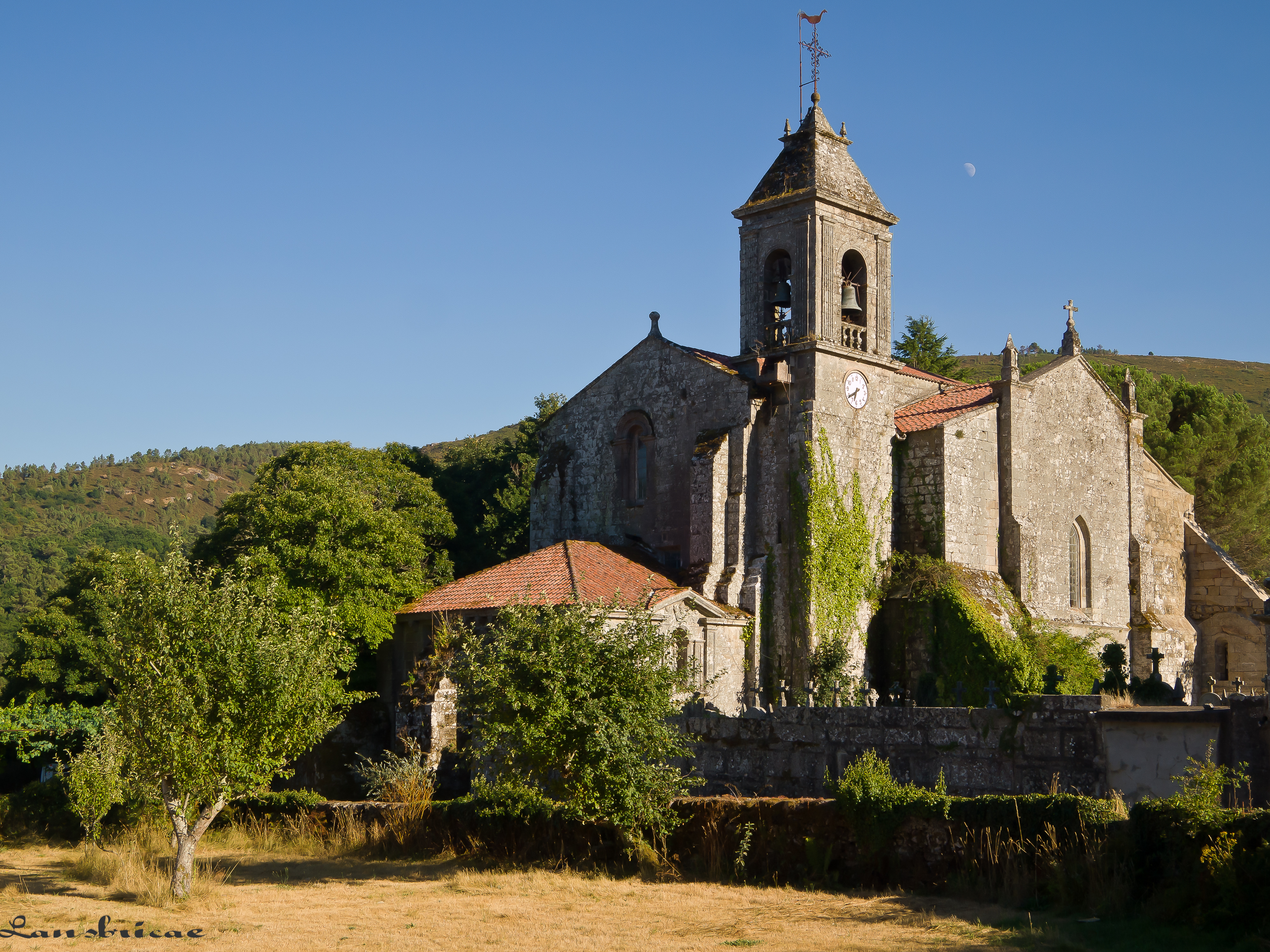 Igrexa do mosteiro de Santa María de Melón